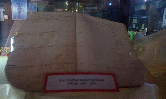 Buku Daftar Masuk Sekolah 1950-1956